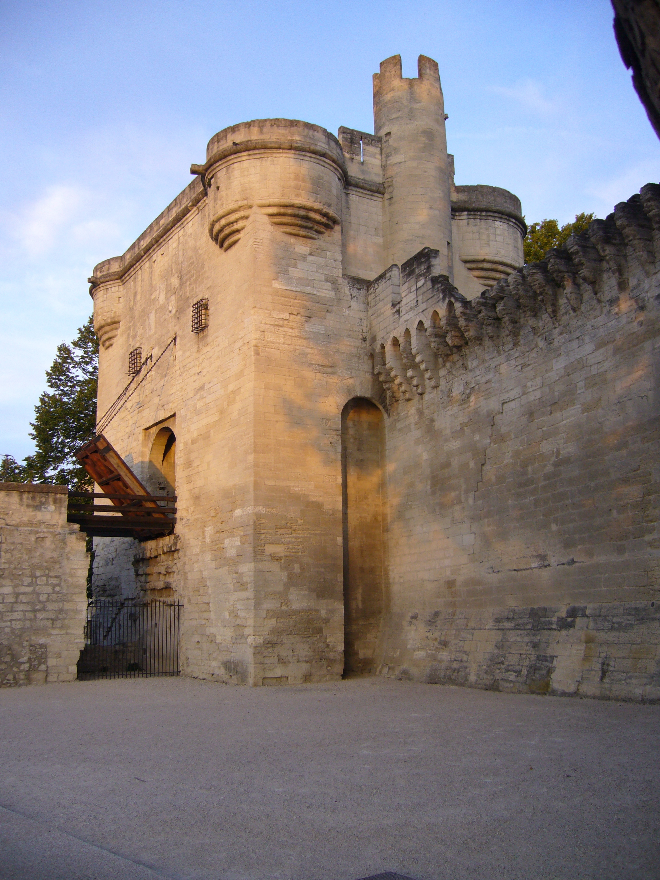 Turm mit Zugbrücke. Abendliche Schließung der Zugbrücke am Pont Saint Bénezet zu Avignon.